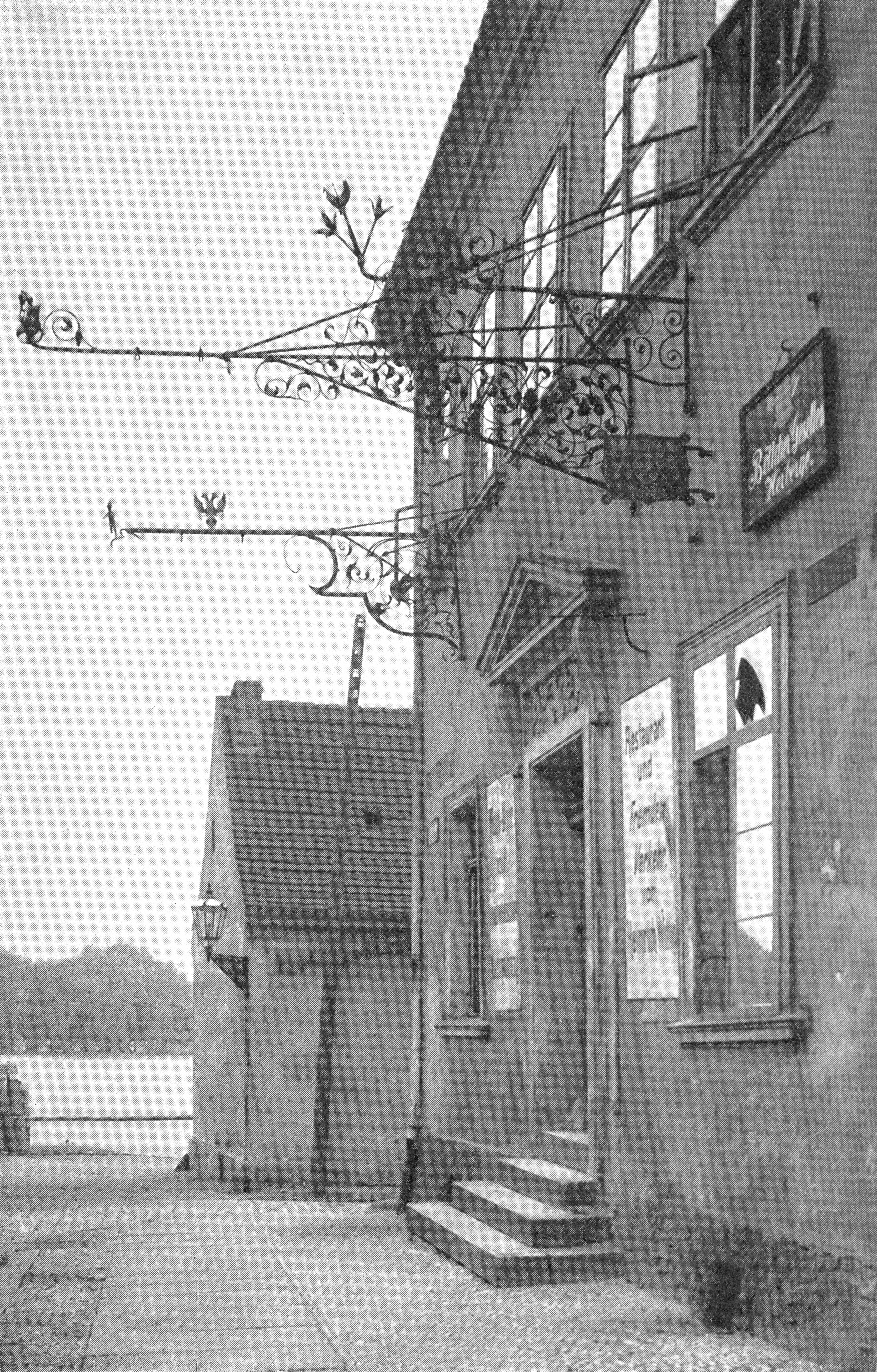 Abb. 159. Haus mit Herbergsschildern, Junkerstraße 10